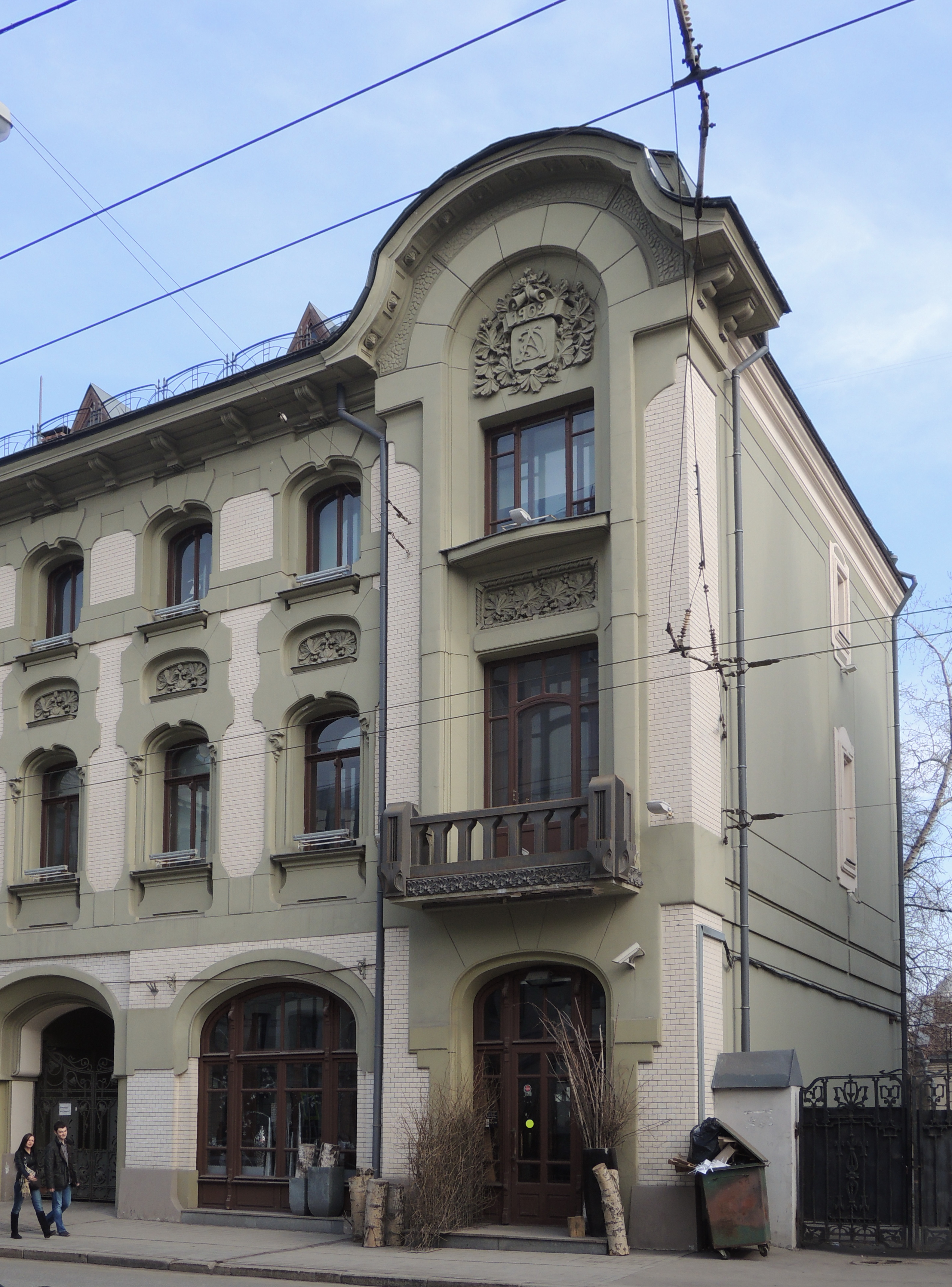 ул. Остоженка